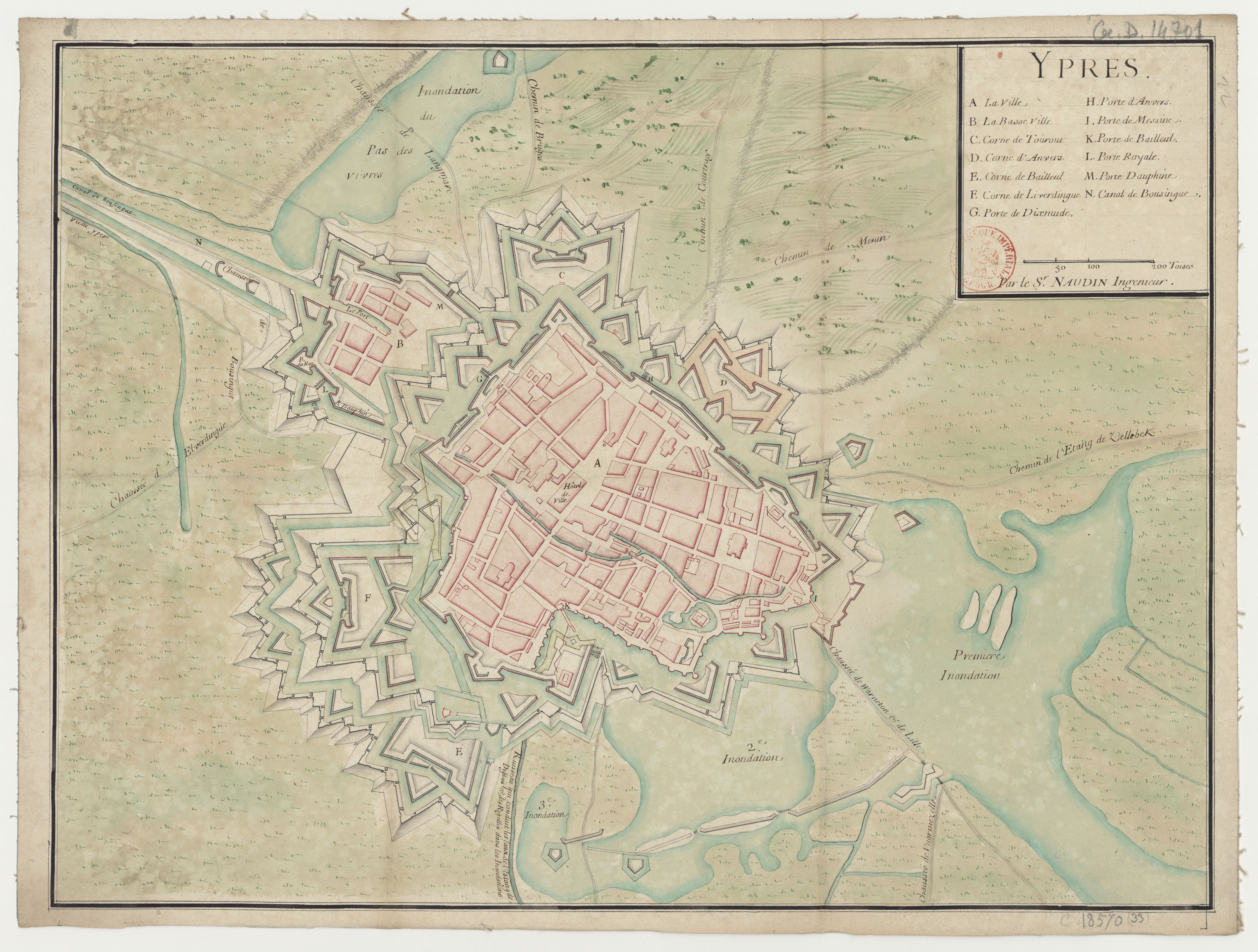 Plan d'Ypres.